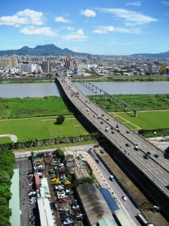 大漢橋